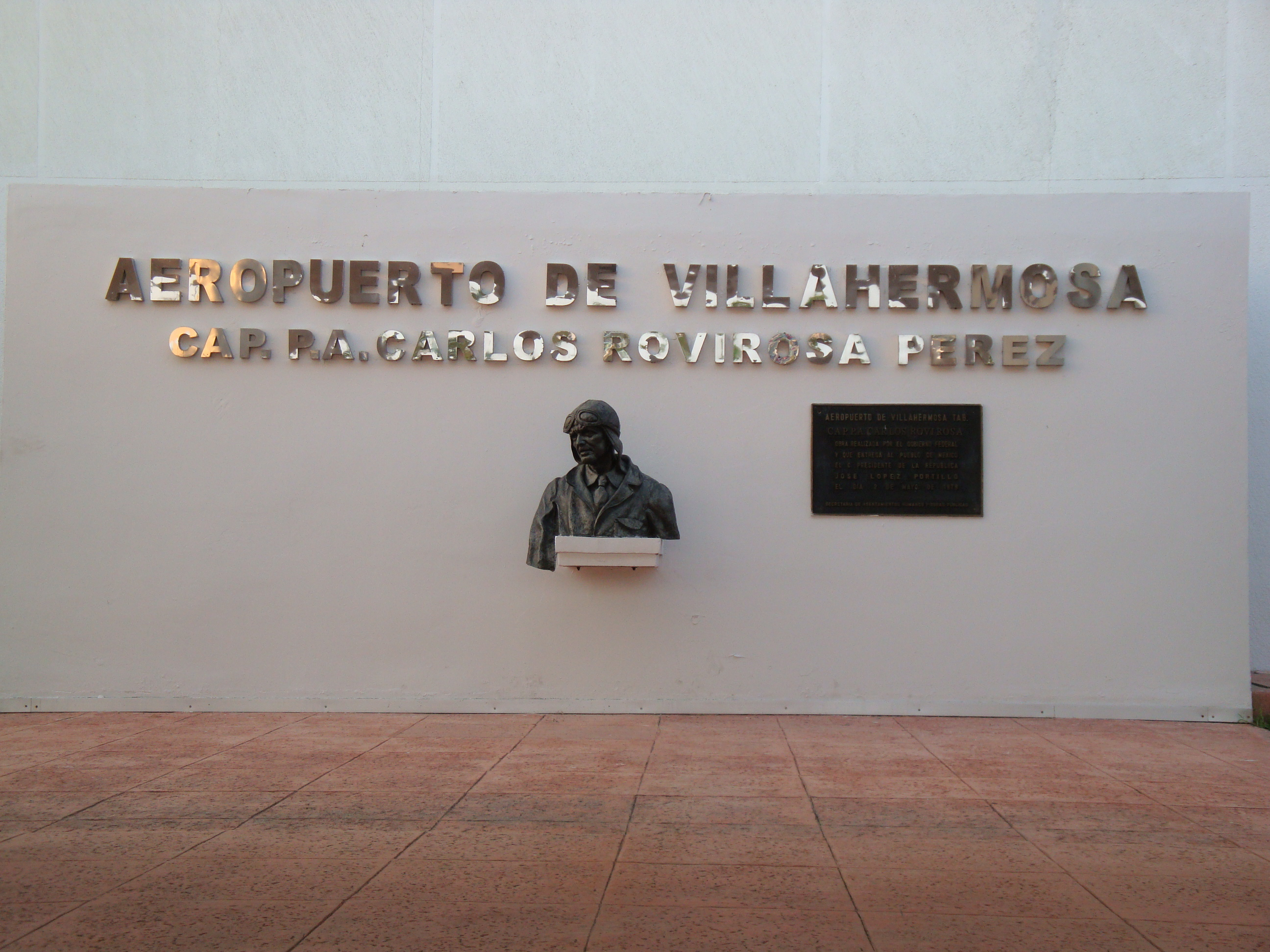 Placa de inauguración y busto de CPA Carlos Rovirosa Pérez, en el Aeropuerto Internacional de Villahermosa, Tabasco, México.